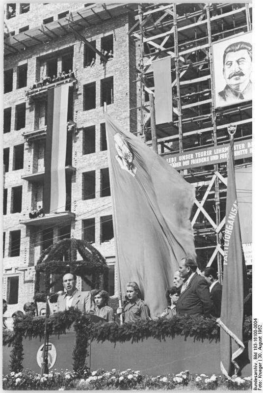 Zentralbild Krueger 30.8.1952 Richtkronen auf S-Nord und B-Süd der Stalinallee Das "Banner der Stalinallee" für ausgezeichnete Leistungen erhielt am 30. August der Block B-Süd überreicht, weil trotz erschwerter Arbeit der Block mit 13 Tagen Terminvorsprung fertiggestellt wurde. Das Richtfest für B-Nord und B-Süd wird heute gemeinsam mit der Bevölkerung und den Bauarbeitern gefeiert. UBz: Max Schneider vom Nationalen Aufbaukomitee bei seiner Ansprache, rechts das "Pieckbanner".